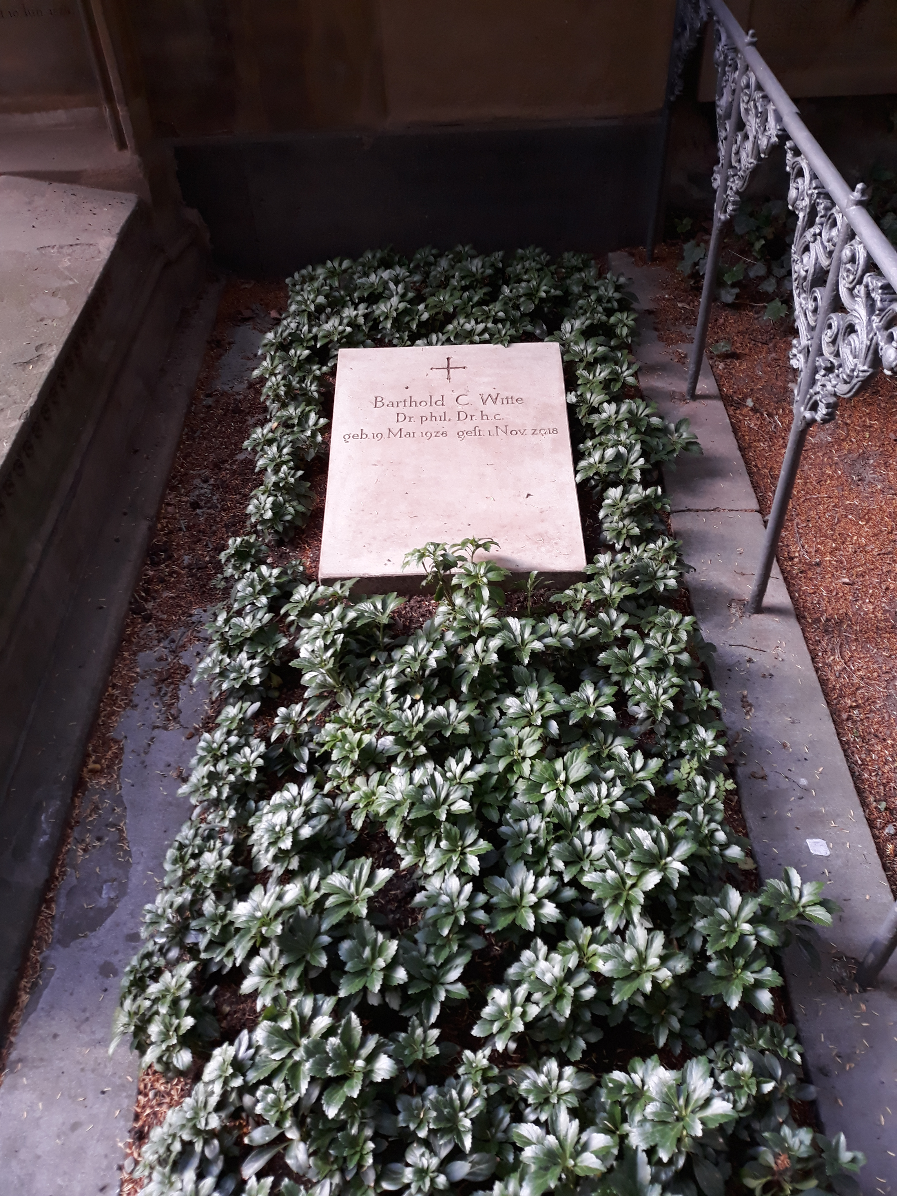 Das Grab des deutschen Ministerialbeamten und Schriftstellers Barthold C. Witte auf dem Alten Friedhof Bonn.